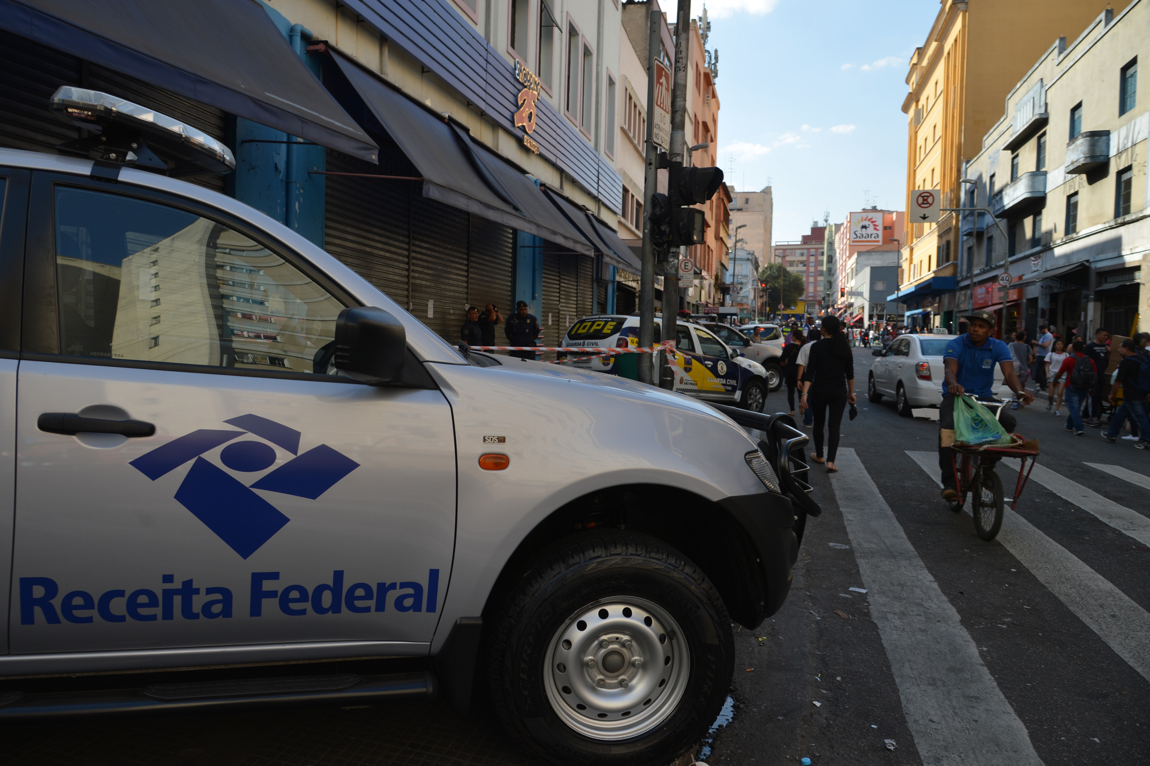 São Paulo - Fiscalização da Operação Setembro, contra o comércio de mercadorias irregulares, fecha lojas na 25 de Março (Rovena Rosa/Agência Brasil)